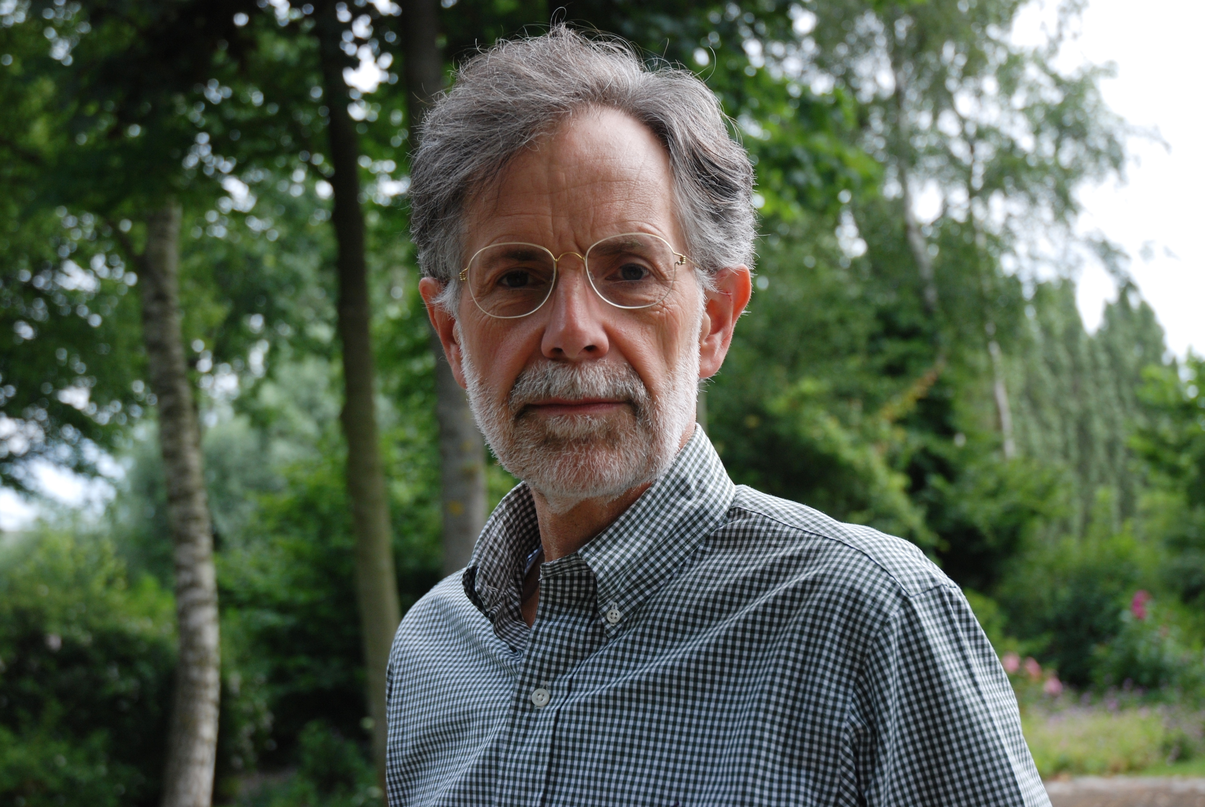 Schilder Bernhard De Grendel in zijn tuin.